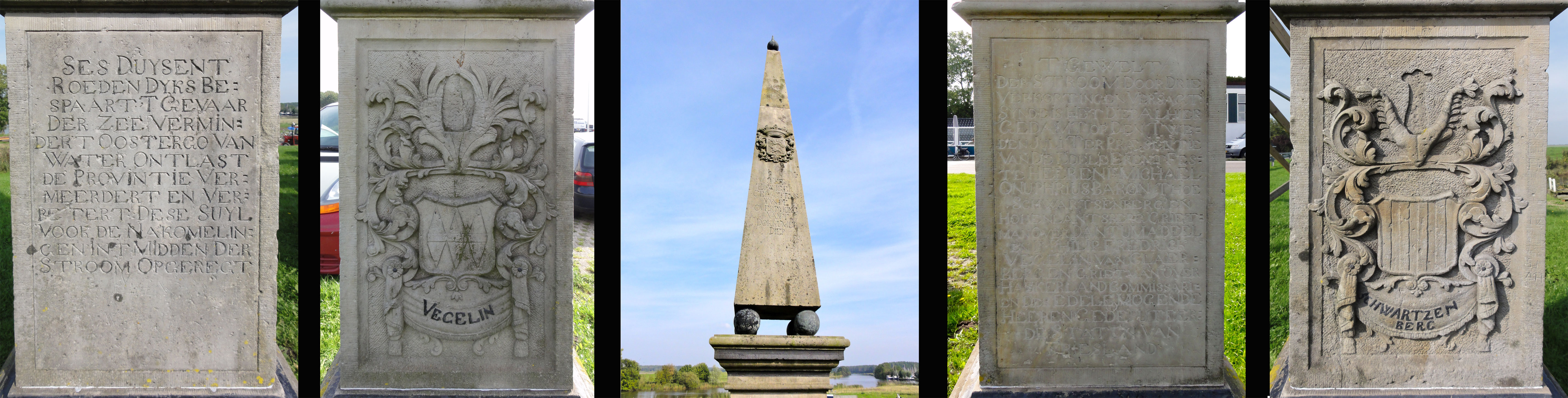 Gedenkteken bij de Dokkumer Nieuwe Zijlen